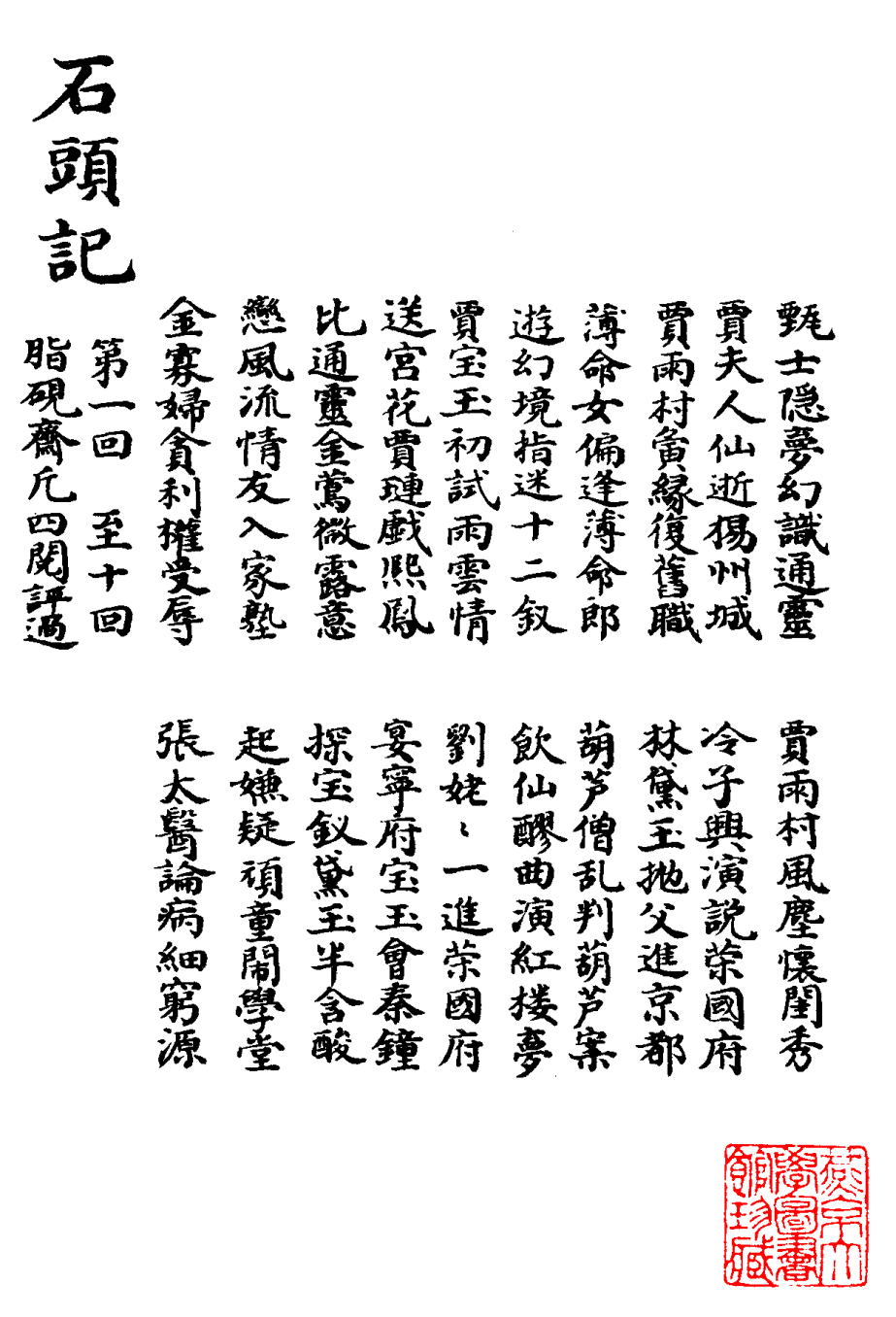 庚辰本第一回書影